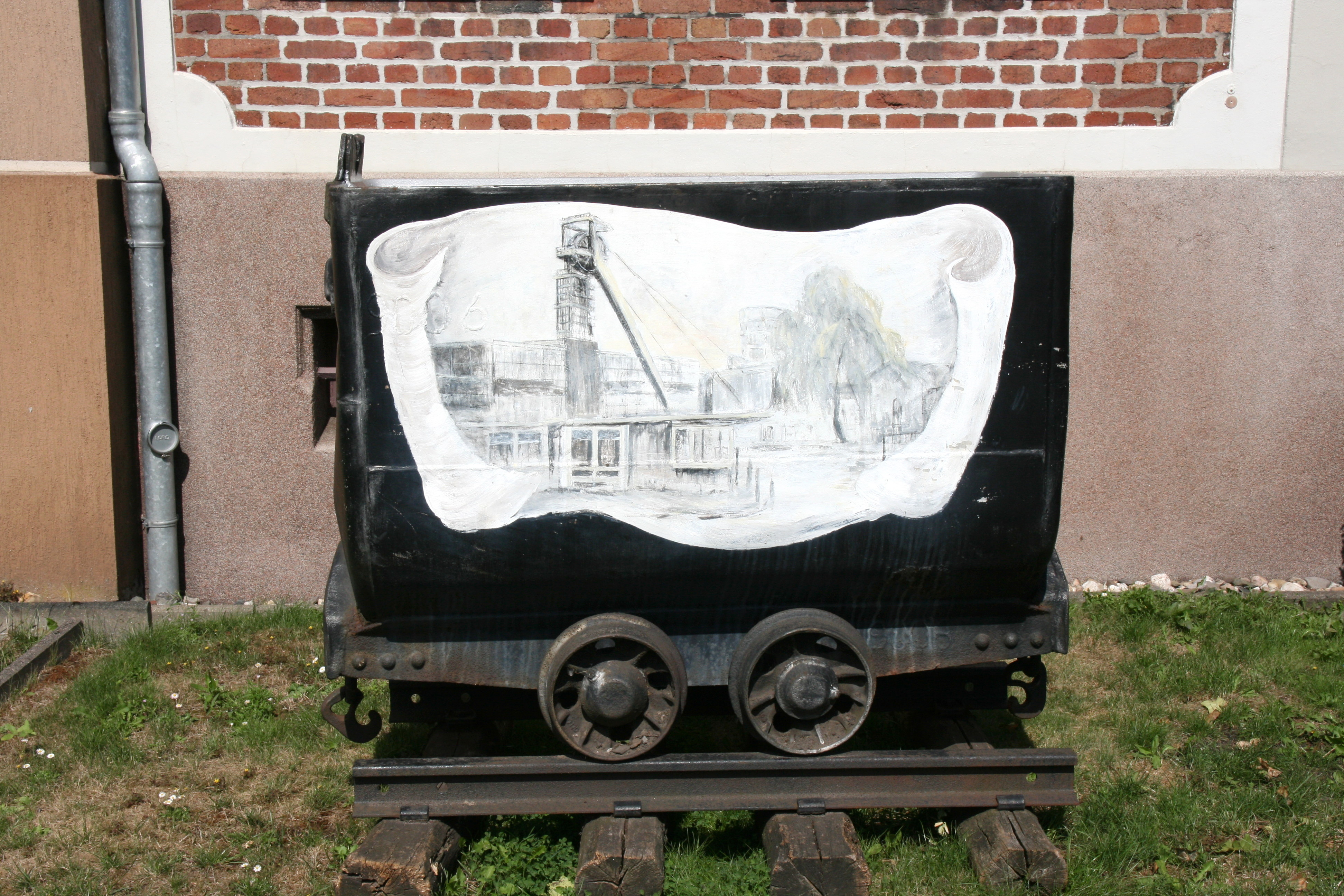 Robertstraße, Dreieckssiedlung in Recklinghausen